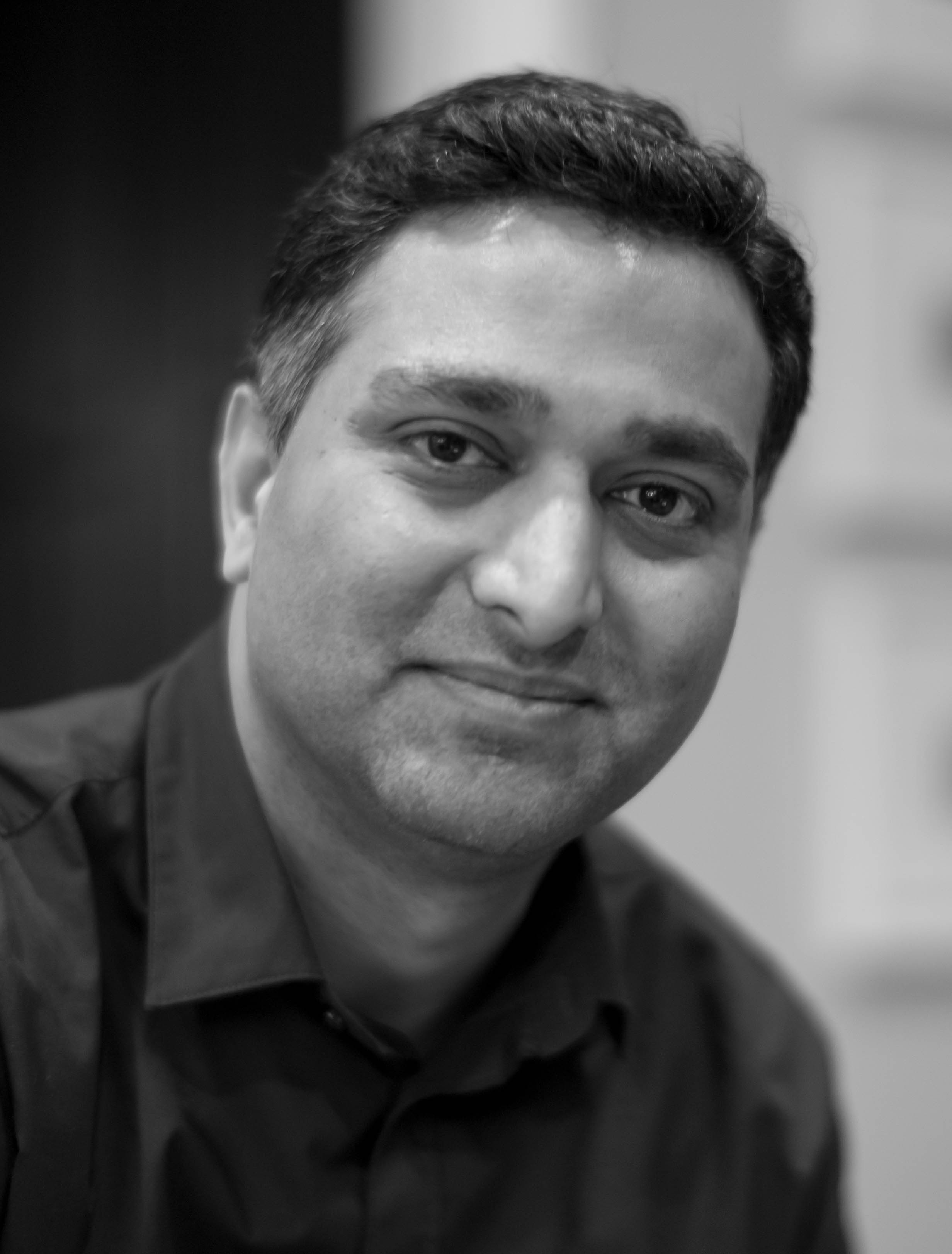 Ramesh Raskar, Cambridge, 2013-11-11